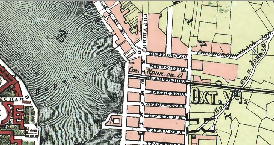 Карта План С.Петербурга составленный по новым сведениям. 1895 год, издание Ильина - фрагмент